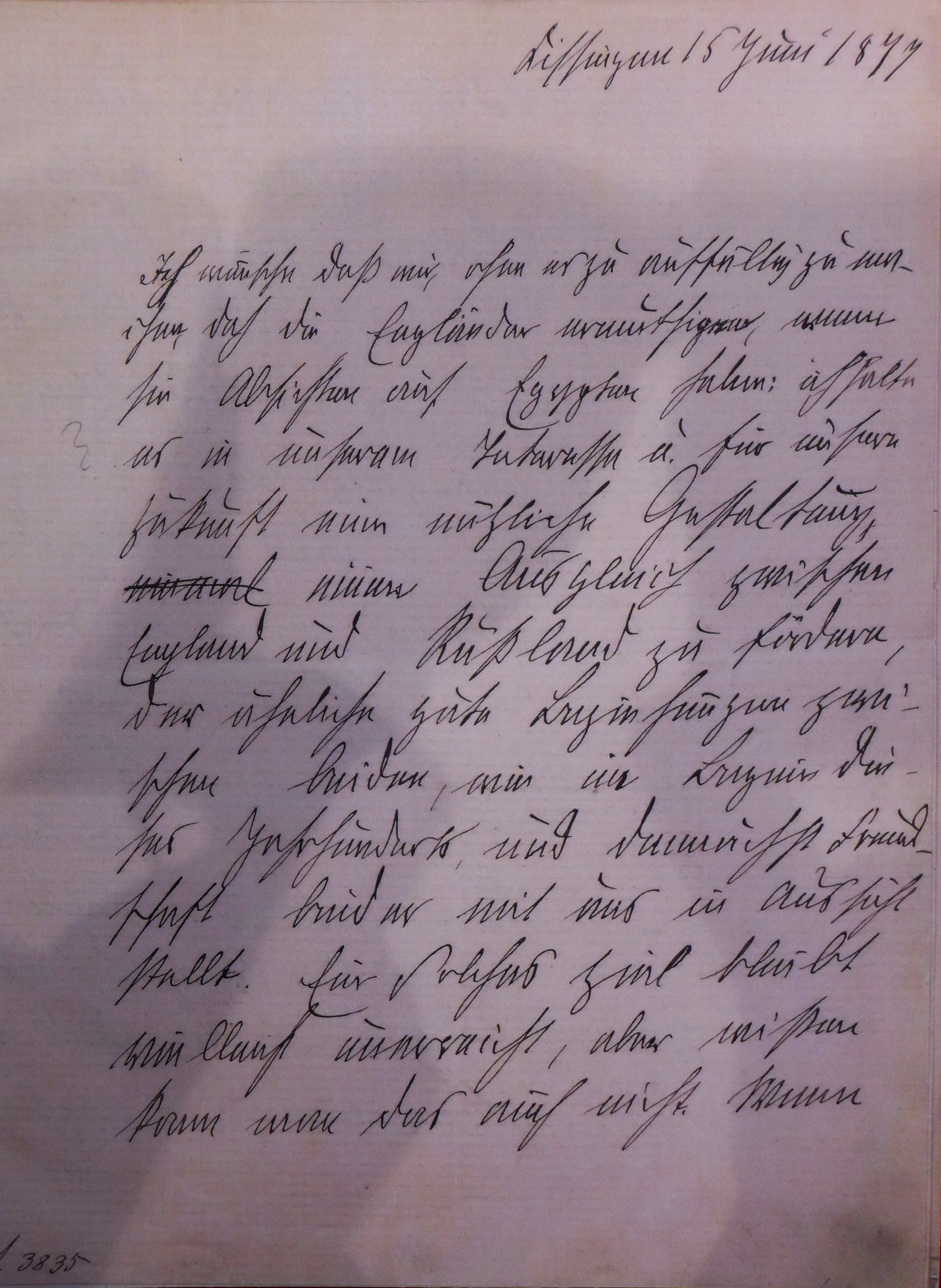 Erste Seite des Kissinger Diktates in der Handschrift Herbert von Bismarcks (Bismarck-Museum Bad Kissingen)